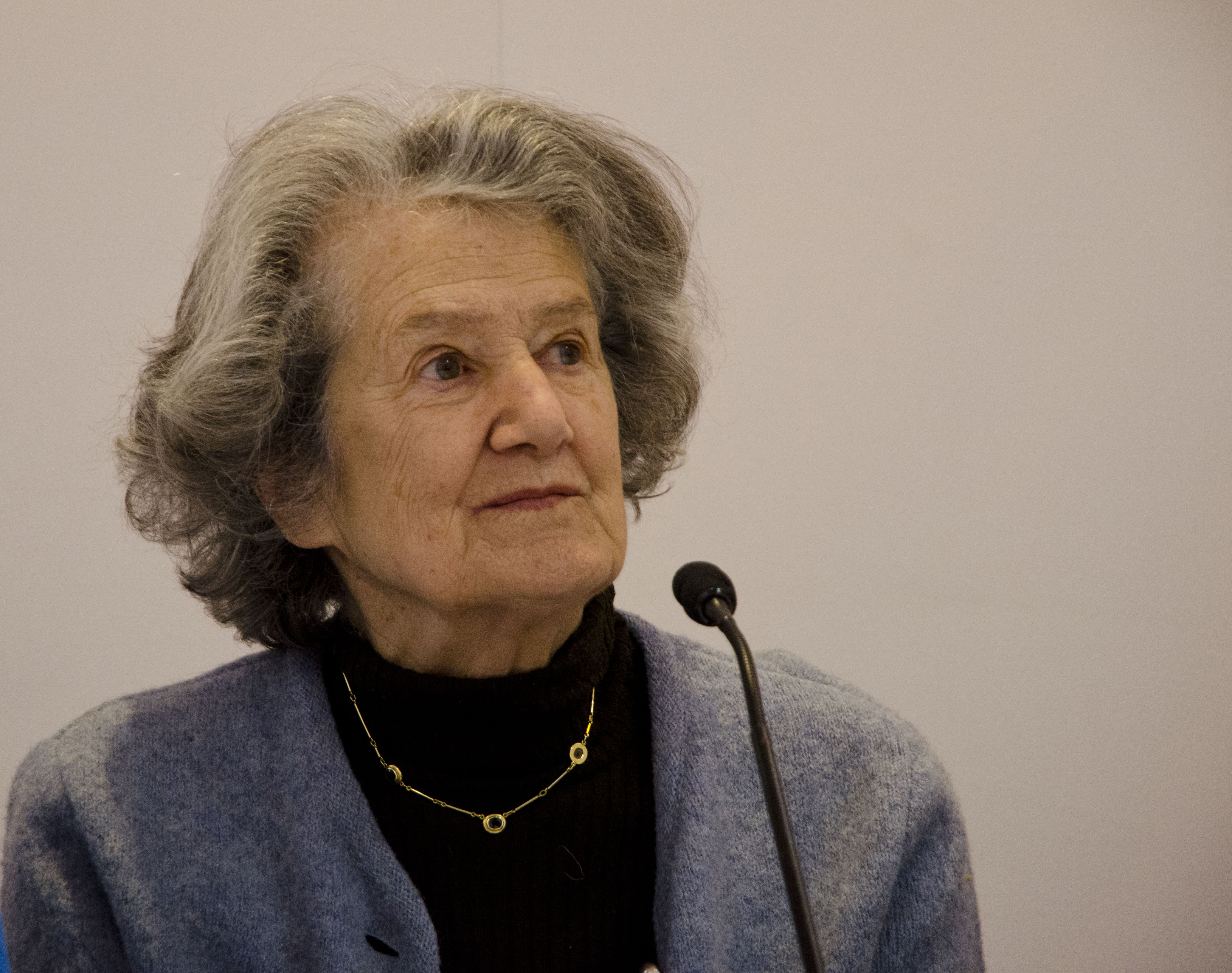 Argentine writer Silvia Baron Supervielle at the 2014 Paris Book Fair. Photo: Augusto Starita / Secretaría de Cultura de la Presidencia de la Nación